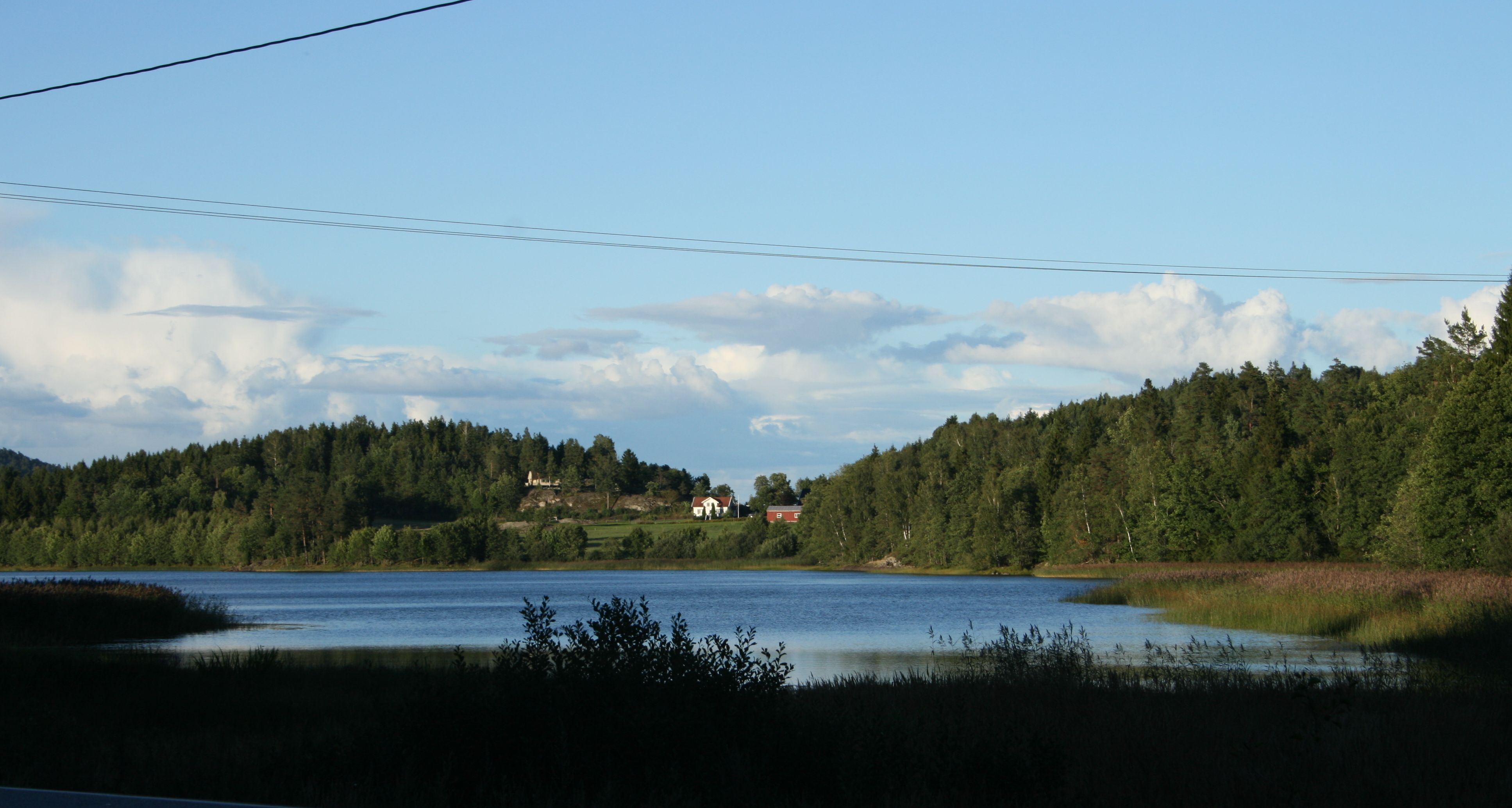 Molandsvannet i Austre Moland, Arendal. Fotografert fra E18.